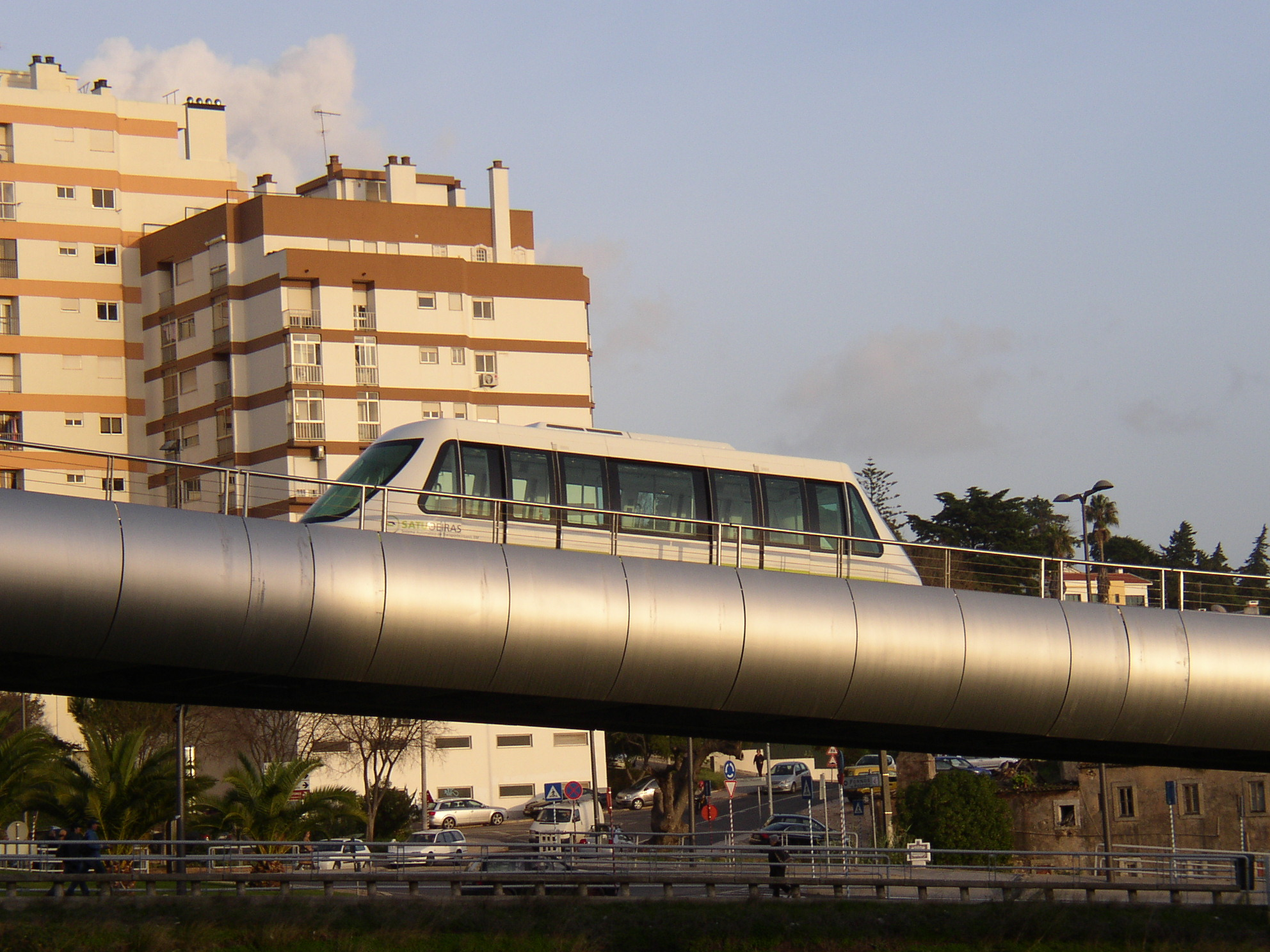 SATU